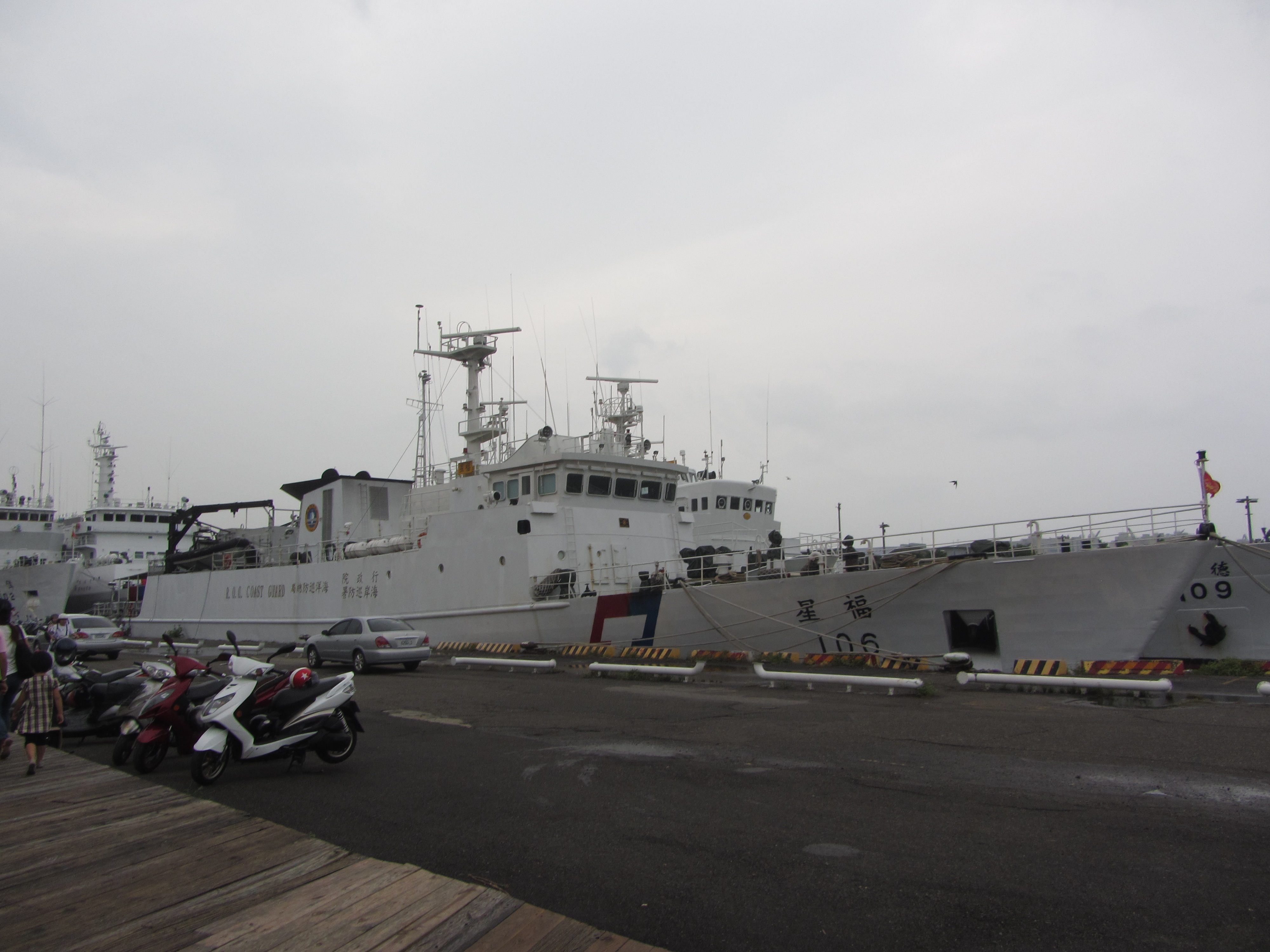 行政院海岸巡防署海洋巡防總局福星艦（CG106）